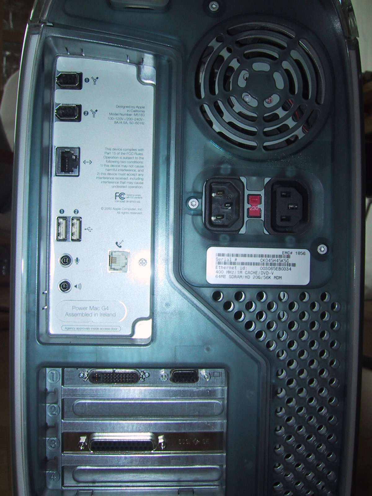 Apple G4 400 Mhz